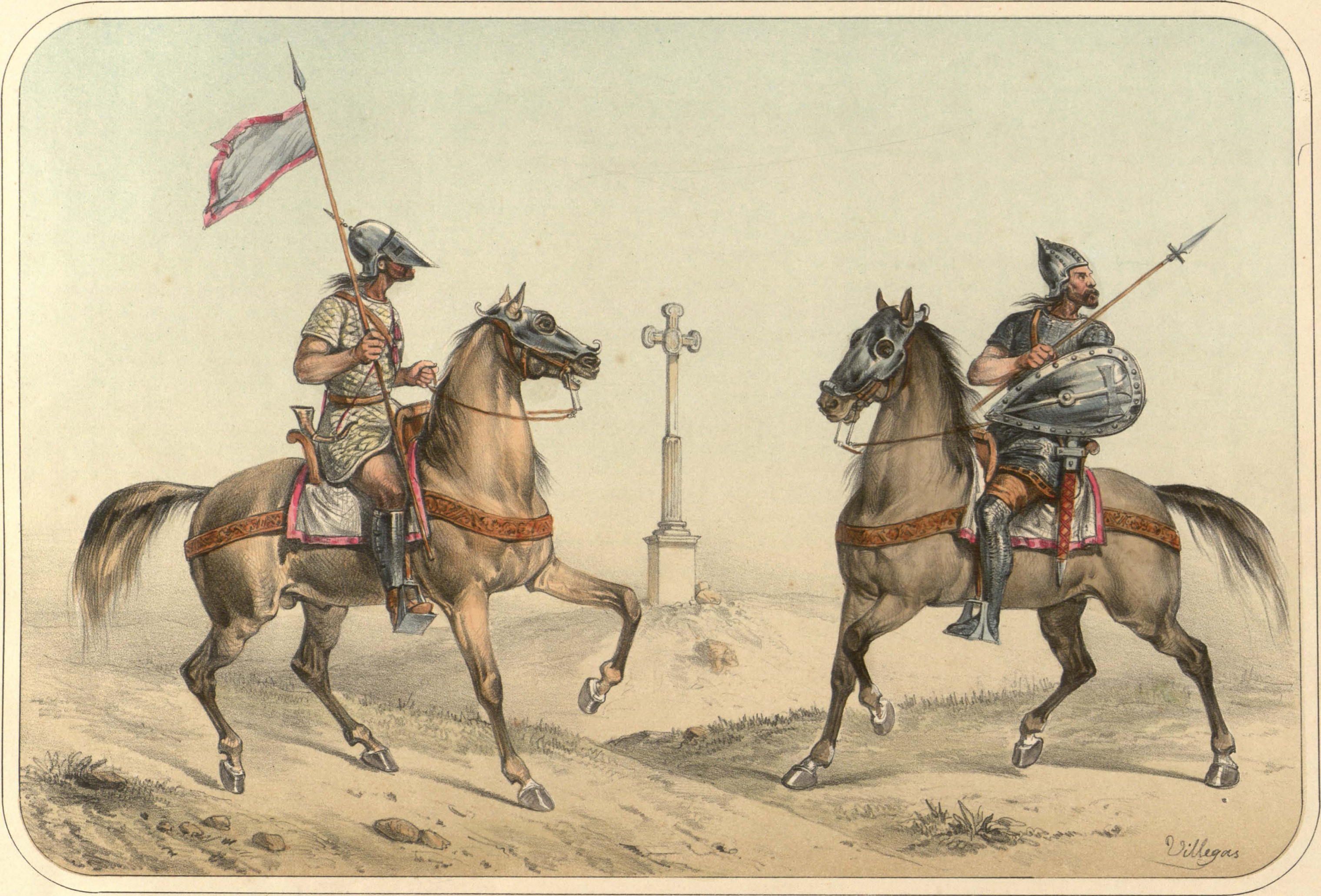 Imagen extraida de la Lámina 2 del Álbum de la caballería española : desde sus primitivos tiempos hasta el día / por el Conde de Clonard ; publicado por la Dirección General del Arma, siendo su Director José Marchesí. Caballeria visigoda: bandóphoro y tiuphado "Los Monarcas godos tenian una Guardia Real de caballería que defendia su persona. El que llevaba el estandarte se llamaba Bandóphoro, y los Jefes tomaban los nombres de Duques, Condes, Gardingos y Tiuphados. Estos últimos mandaban 1,000 caballos, que se dividian en dos porciones de á 500 hombres, regidas por segundos Jefes llamados Quingentarius."